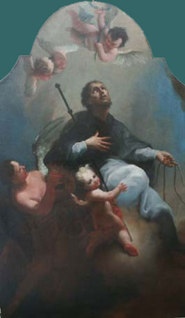 Hl. Koloman Altarbild der Pfarrkirche Laab im Walde bei Liesing